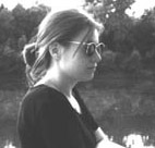 Judit Gal